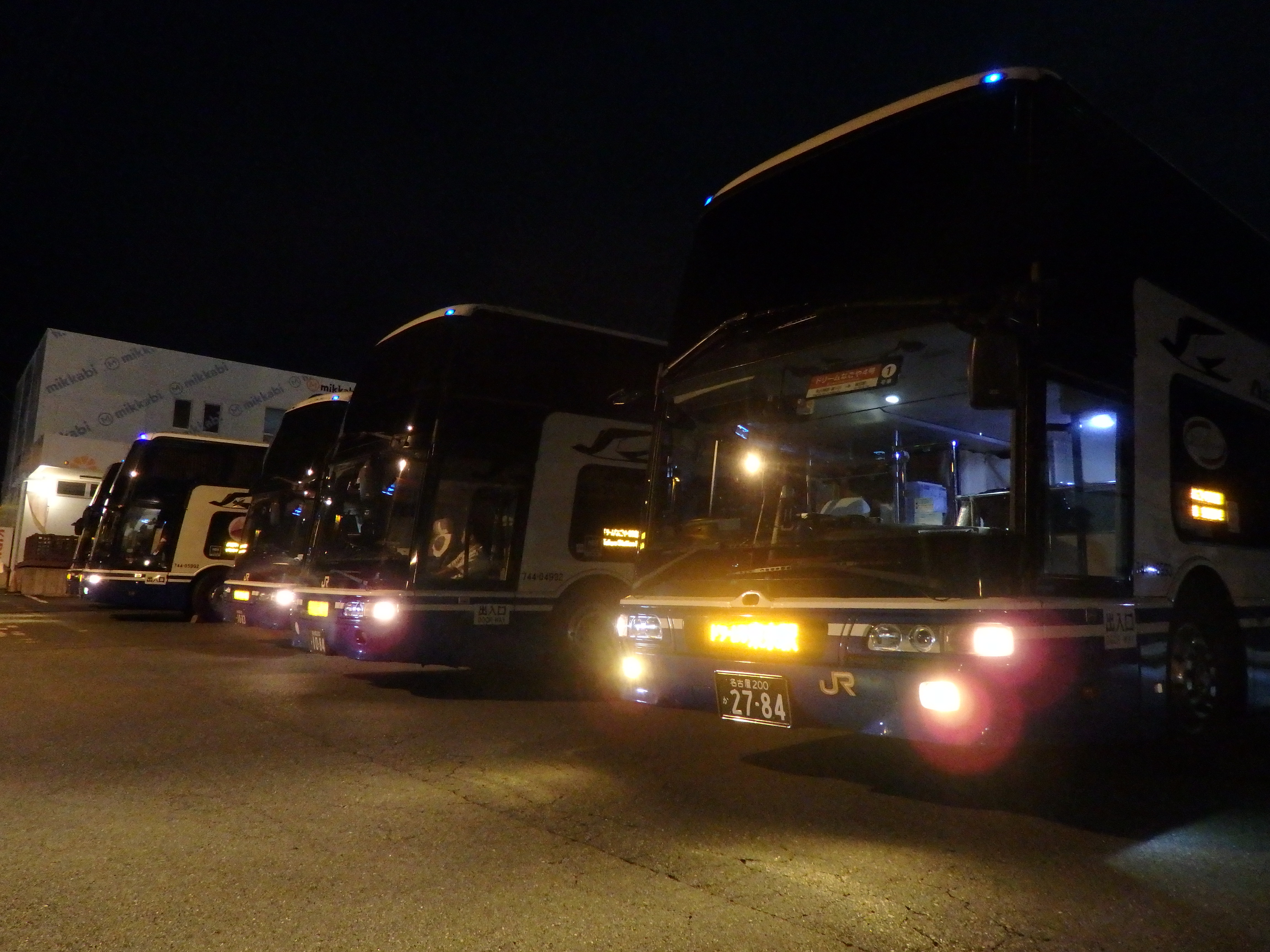 JRバス関東東京支店三ヶ日営業所前の駐車場に並ぶJR東海バスのエアロキング。以前はドリームなごや号を始めとして多くの名古屋-東京間の夜行便がここで開放休憩を実施しており、このような光景が見られたが現在は愛知県側での休憩場所が浜名湖SAへ変更されたため、見られなくなっている。